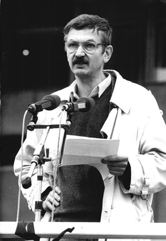 ADN-ZB Link 4.11.89 Berlin: Demonstration 500.000 Bürger beteiligten sich an einer Demonstration für den Inhalt der Artikel 27 und 28 der Verfassung der DDR. Auf dem anschließenden Meeting auf dem Alexanderplatz ergriff auch der Schriftsteller Christoph Hein das Wort.